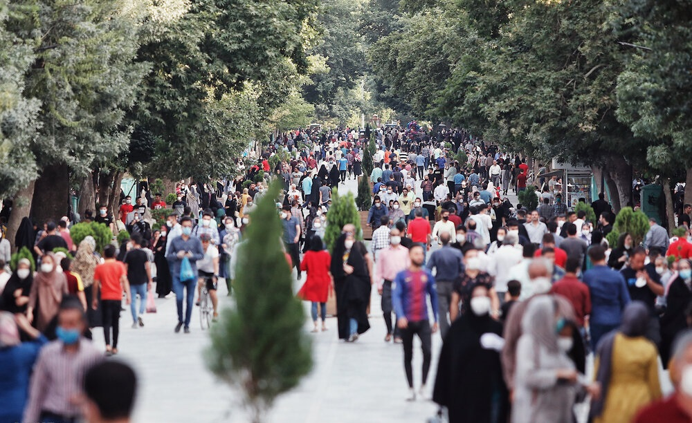 مردم ایران در مرداد 1399